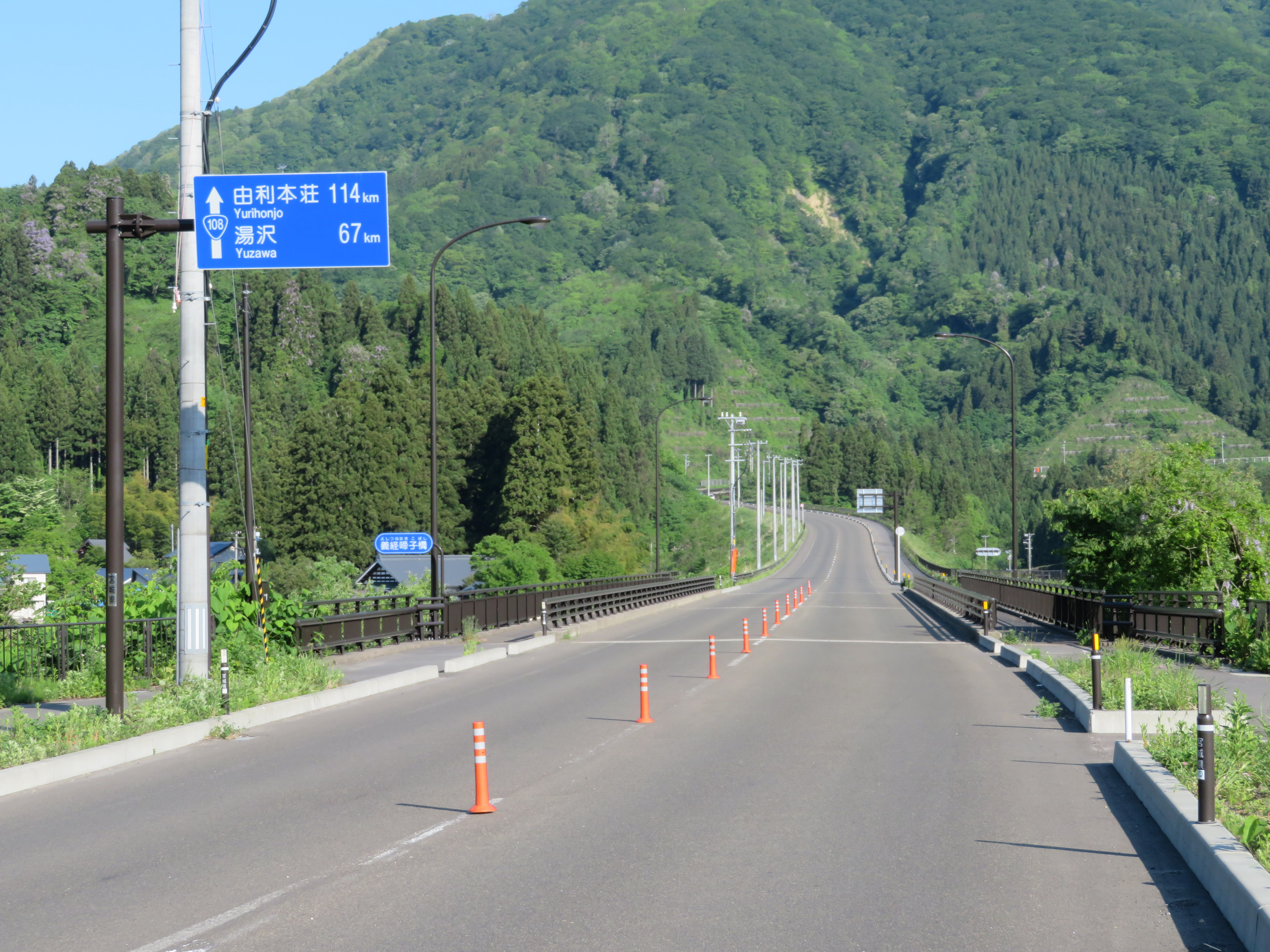 国道108号線花淵山バイパス宮城県大崎市鳴子温泉古戸前付近（仙秋鬼首トンネル方面を撮影） Canon PowerShot SX720 HS